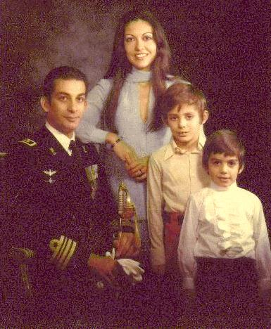 Принц Шахрияр Шафик со своей семьей